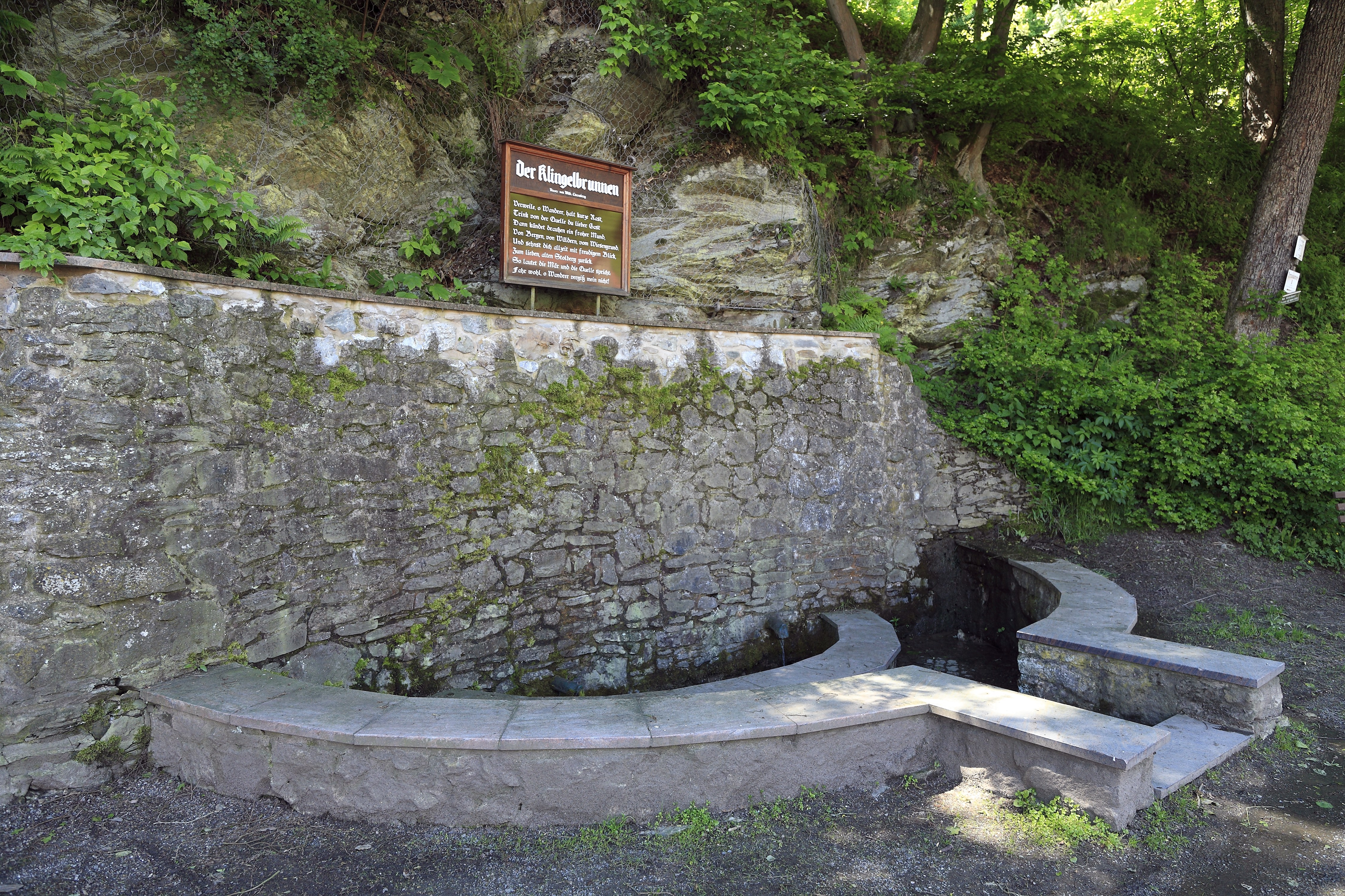 Auf Höhe Rittergasse 15 auf der anderen Seite der Lude, die erst nach der Vereinigung mit Großen Wilde Thyra heißt.